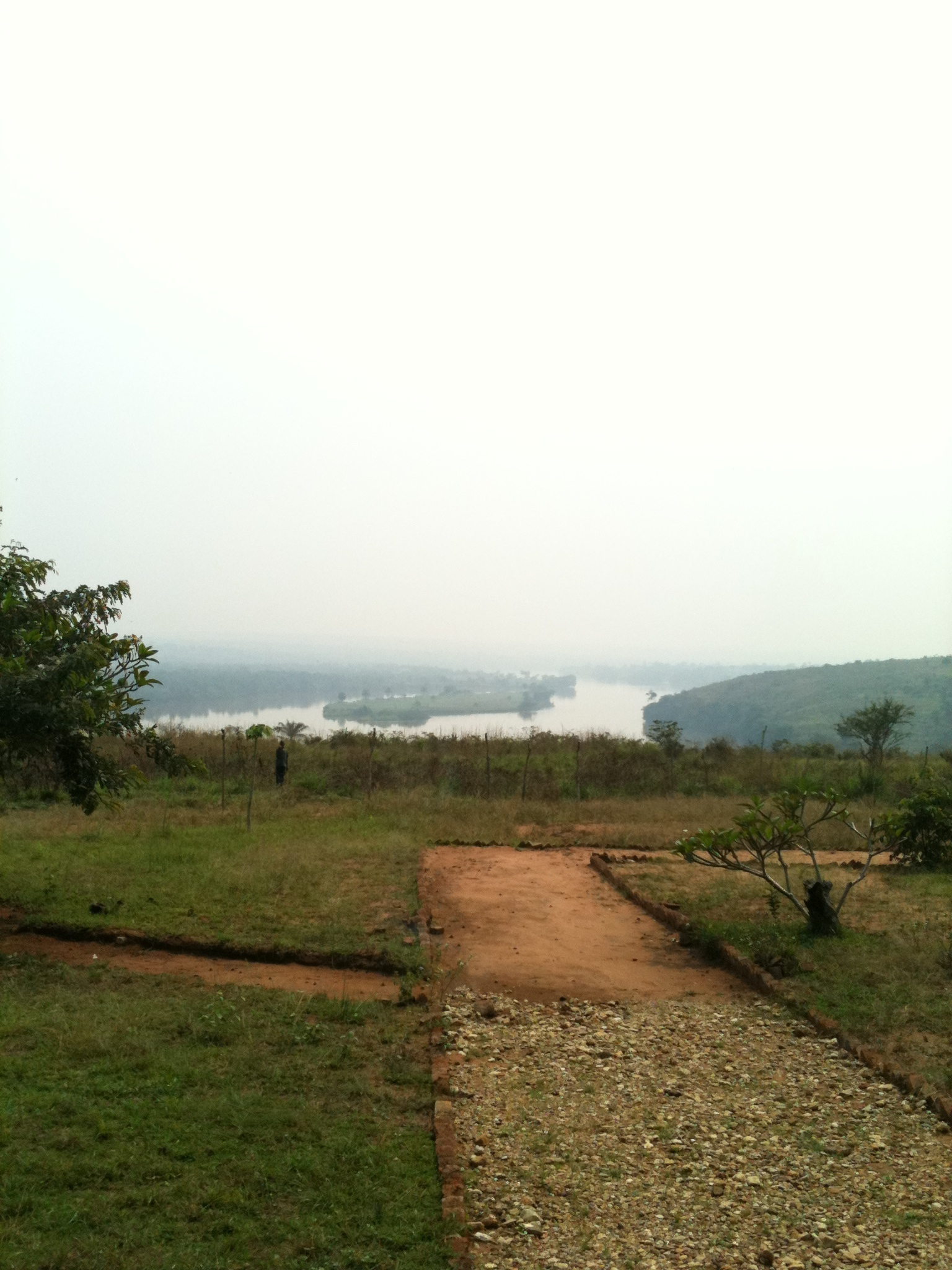 Kalonda